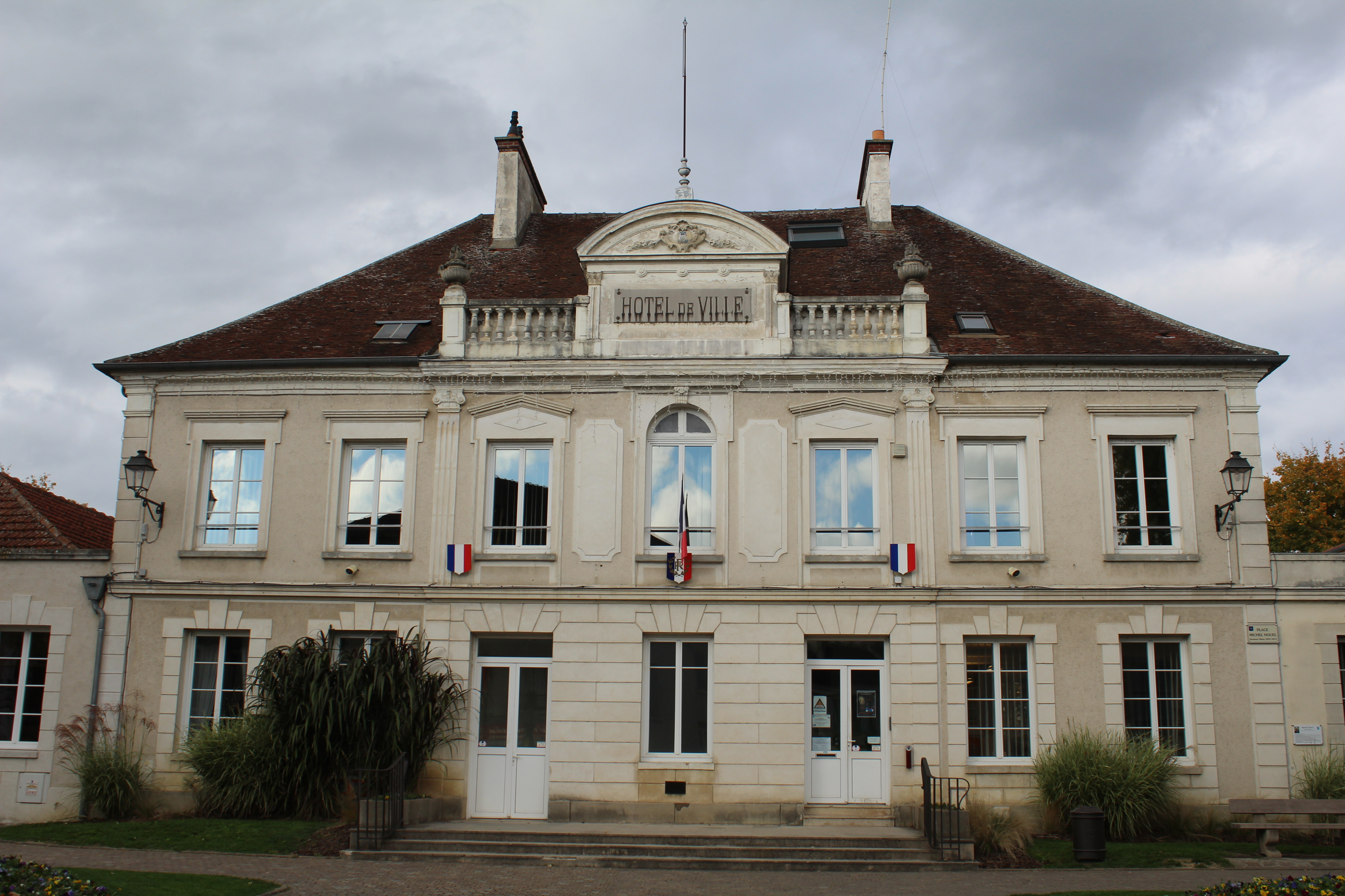 Hôtel de ville de Crécy-la-Chapelle.